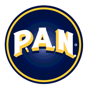 Isologotipo de Harina PAN